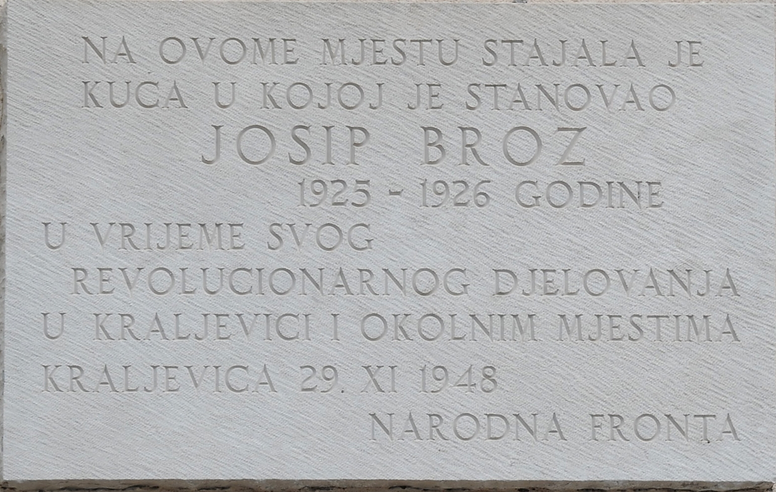 Spomen ploča na mjestu u Kraljevici gdje je stanovao Josip Broz Tito 1925.-1926.